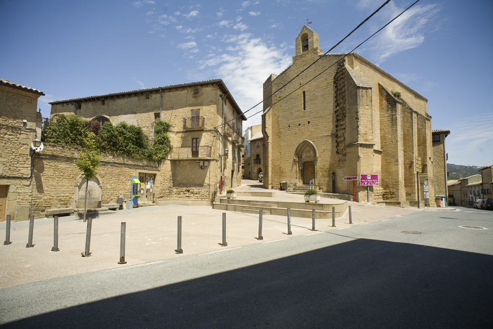 Iglesia de San Martín de Tours, San Martín de Unx, NavarraEuskara: San Martin Tourseko eliza, San Martin Unx, Nafarroa